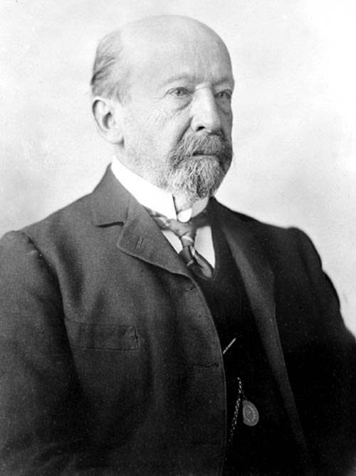 José Toribio Medina Zavala ( * Santiago, Chile, 21 de octubre de 1852 – † 11 de diciembre de 1930) fue un bibliógrafo e historiador chileno, el mayor recolector de fuentes para el estudio de la historia de su país.